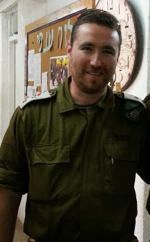 רונן מנליס וכפיל, בעת כהונתו כקצין המודיעין של מפקדת העומק